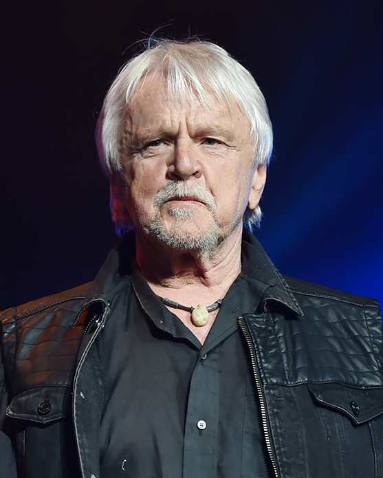 Ján Lehotský